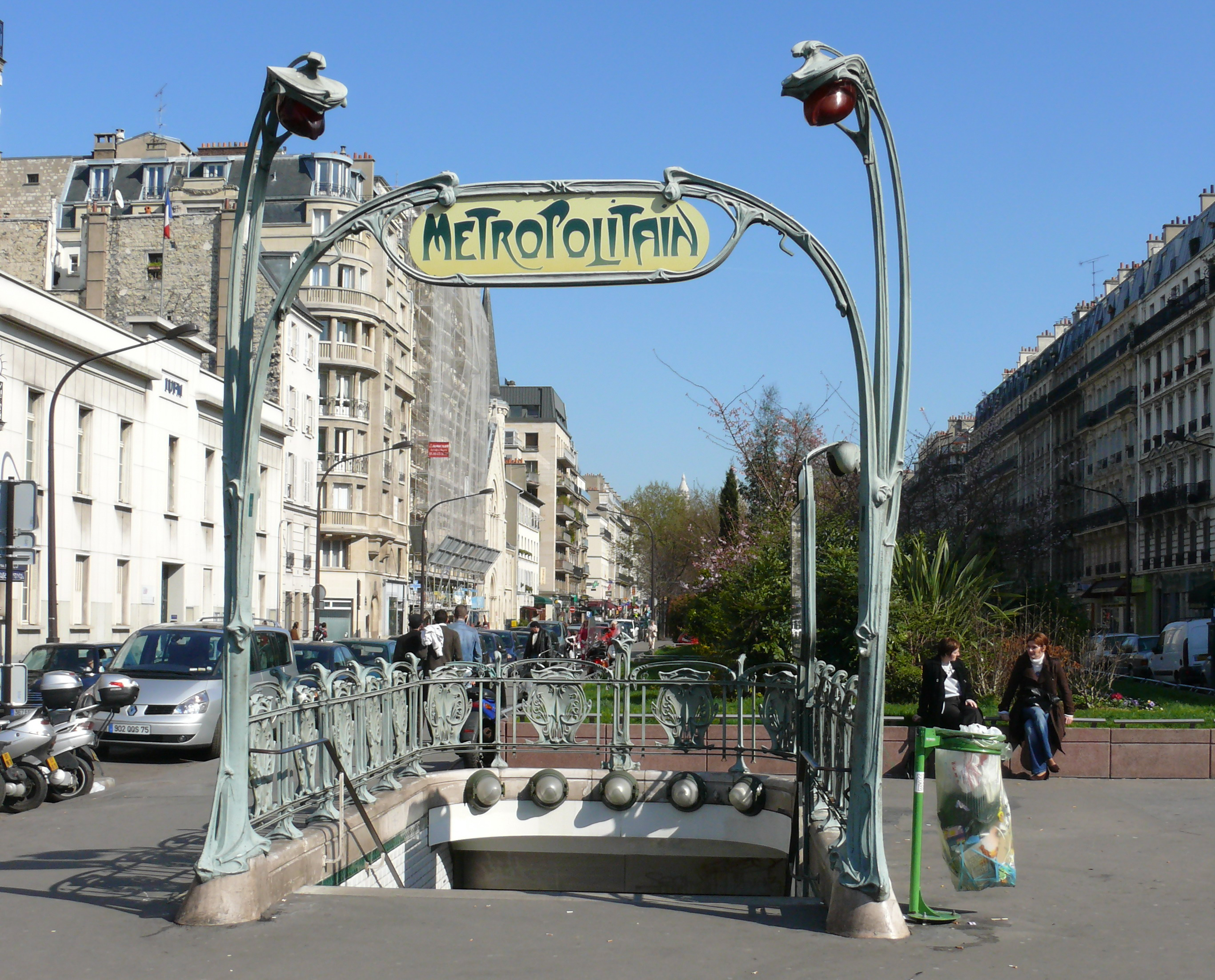 Entrée style Guimard de la station Rome du Métro de Paris